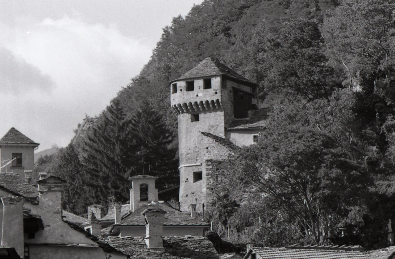 Servizio fotografico : Vogogna, 1980 / Paolo Monti. - Strisce: 3, Fotogrammi complessivi: 12 : Negativo b/n, gelatina bromuro d'argento/ pellicola ; 35 mm. - ((Sul portanegativi: [NIKMAT? FP4] e iscrizione: "1-12 Castello di Vogogna". - Occasione: Documentazione per la pubblicazione